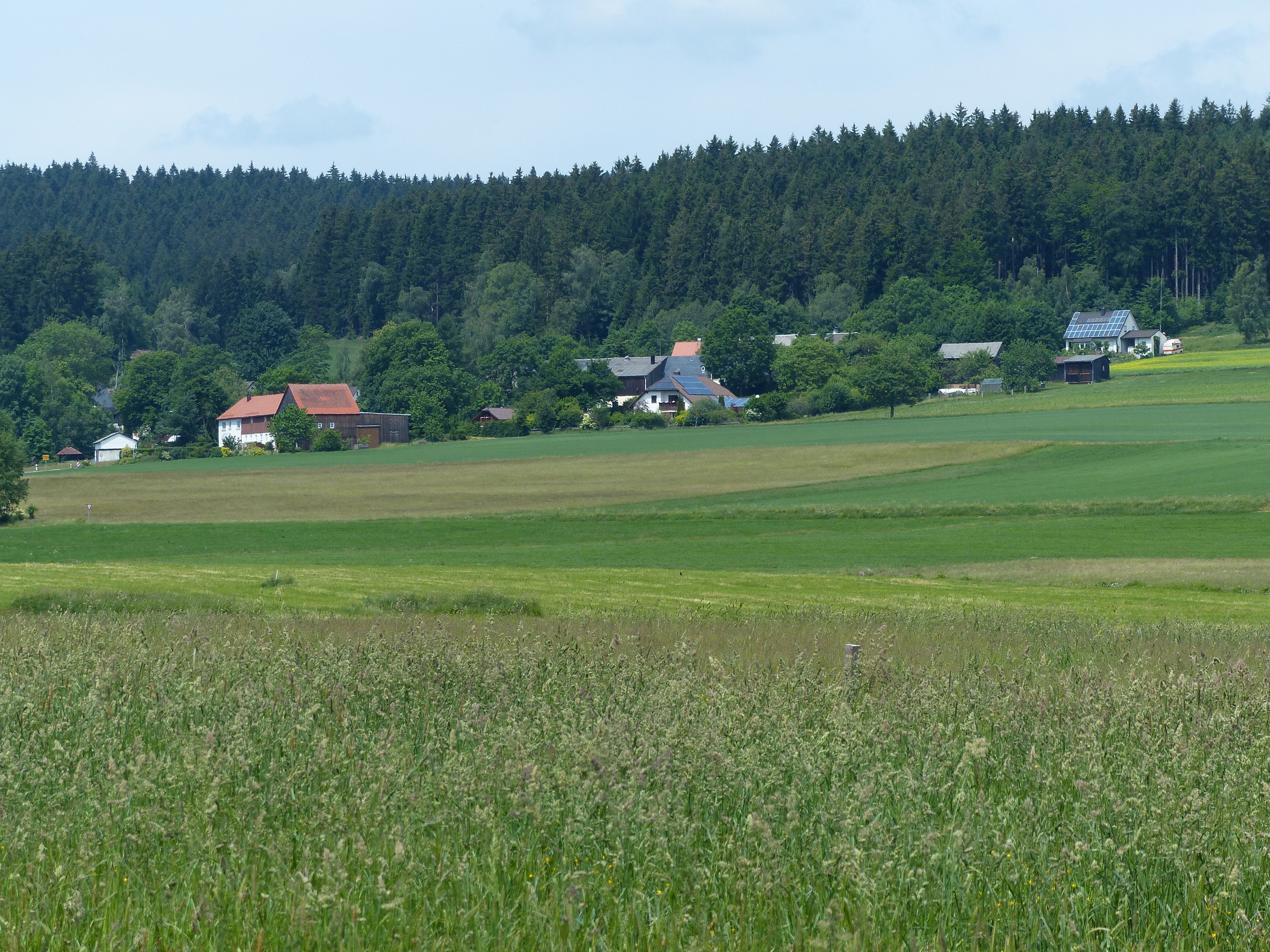 Ansicht aus Ruppertsgrün, Ortsteil von Weißenstadt